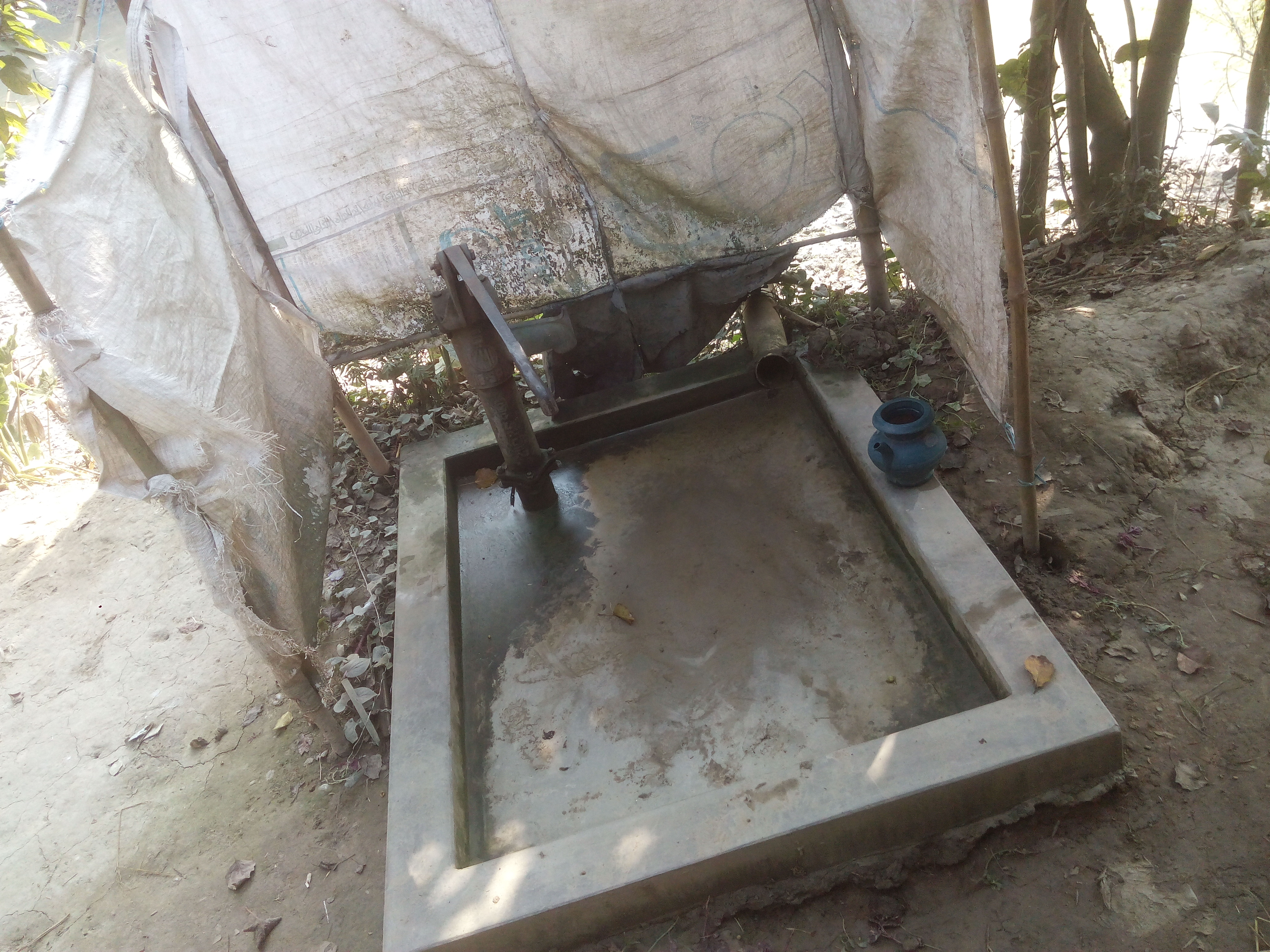 এটি একটি গ্রামীণ নলকূপ।